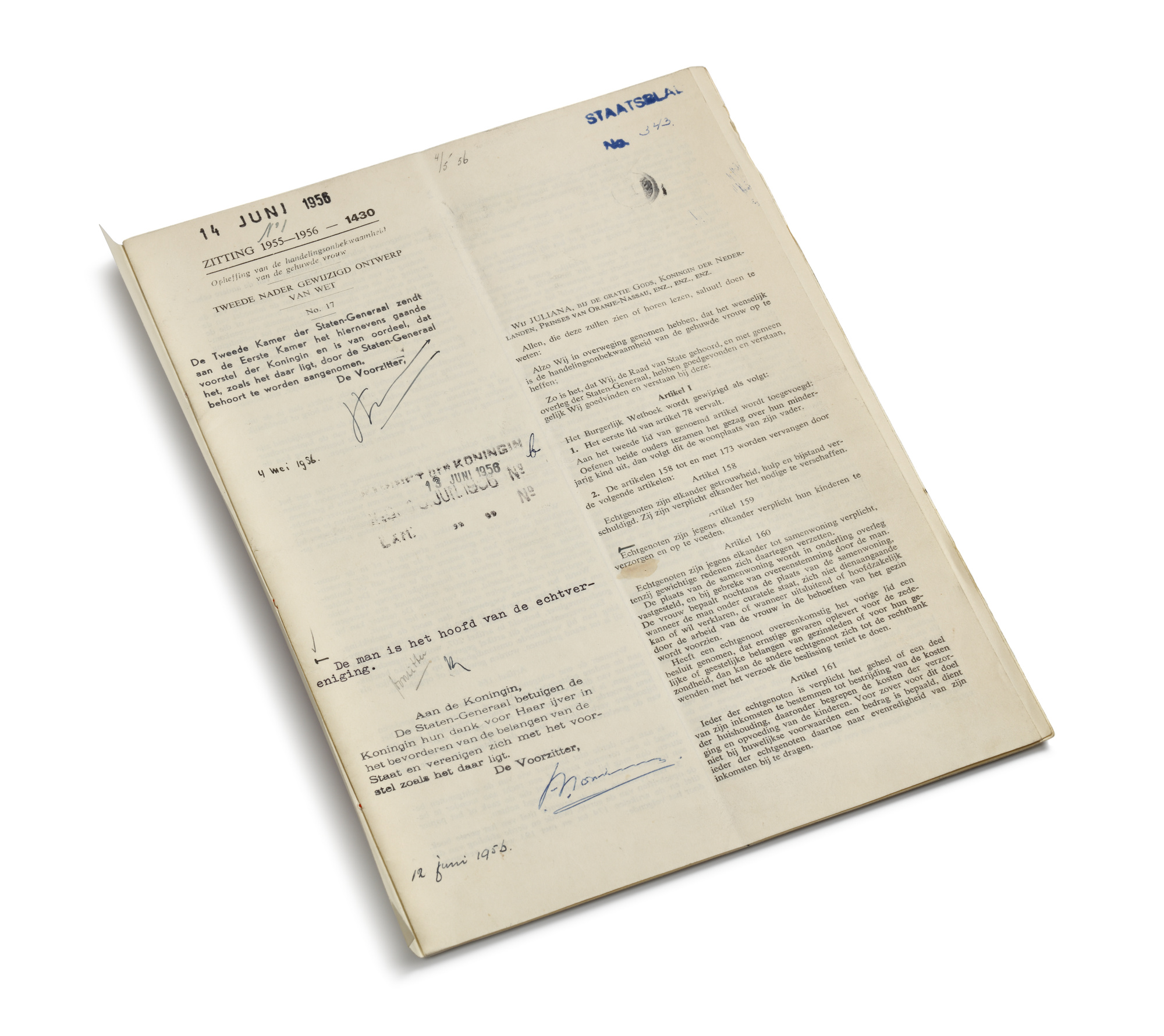 Wet Lex van Oven, afschaffing handelsonbekwaamheid getrouwde vrouwen Kabinet der Koningin periode 1946-1985, inventarisnummer 10639